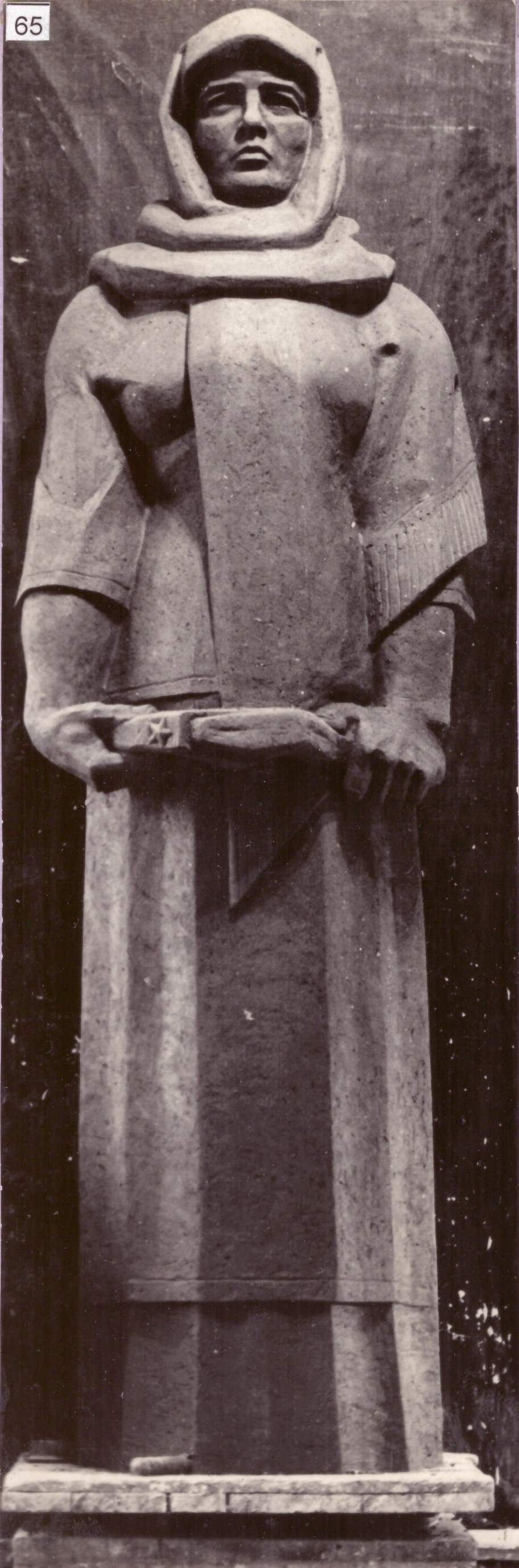 Пам’ятник загиблим воїнам-односельчанам в роки Великої Вітчизняної війни 1941-1945 р.р. С. Тимків Новоушицький район Хмельницька область. 1970. Скульптор Таранченко В.О., архітектор Макаревич Ю.О. Литий бетон.